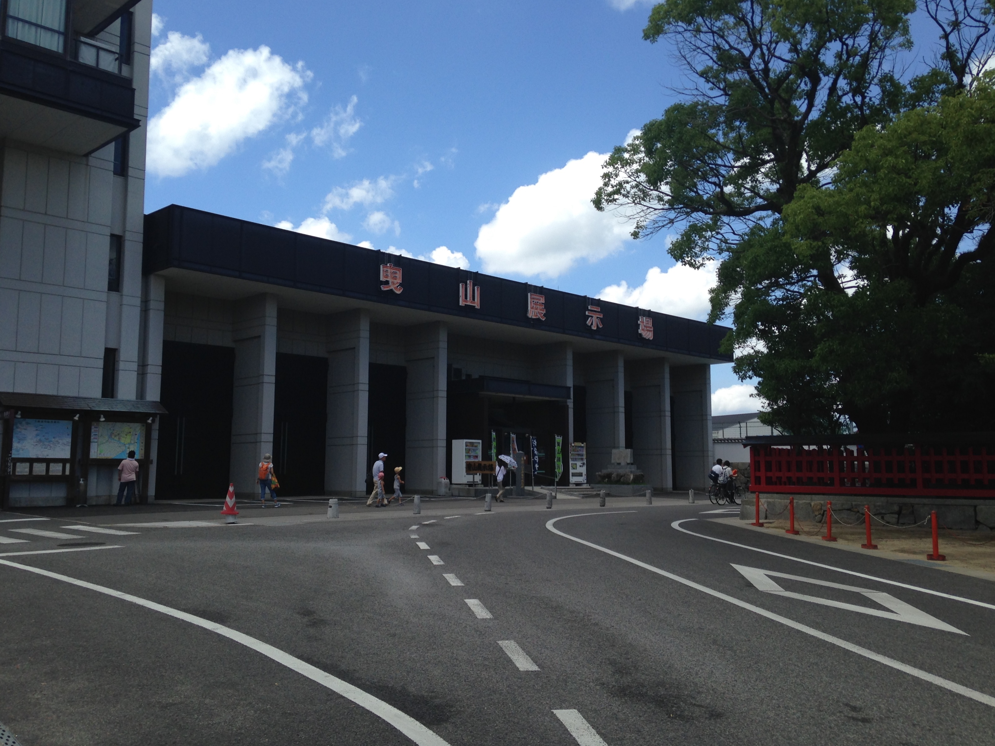 唐津市民会館の側にある曳山展示場